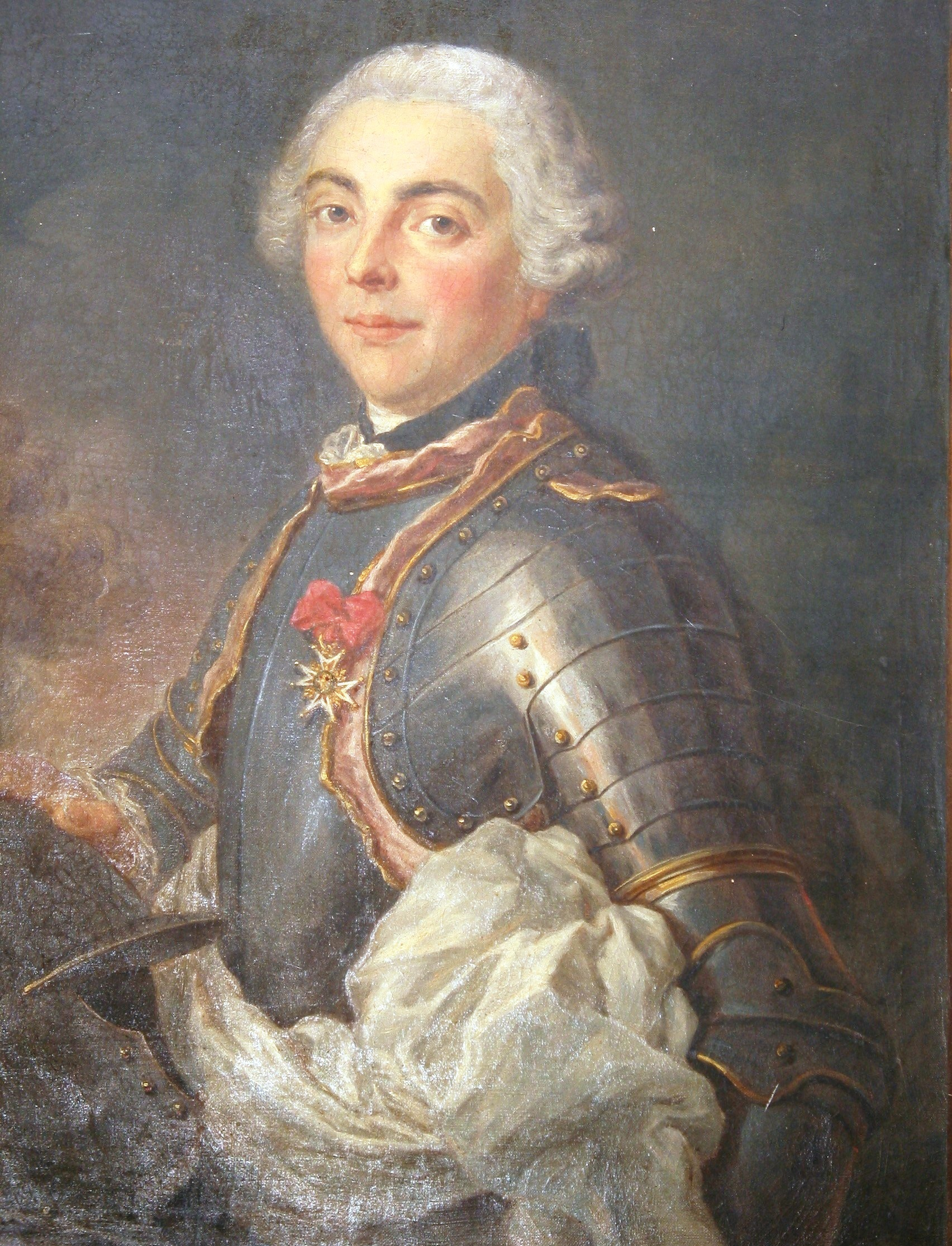 Portrait of Athanase Louis Marie de Loménie, comte de Brienne (1730–1794)